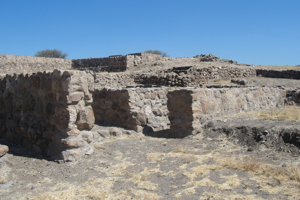 Template:Huandacareo, entrance to Main Structure